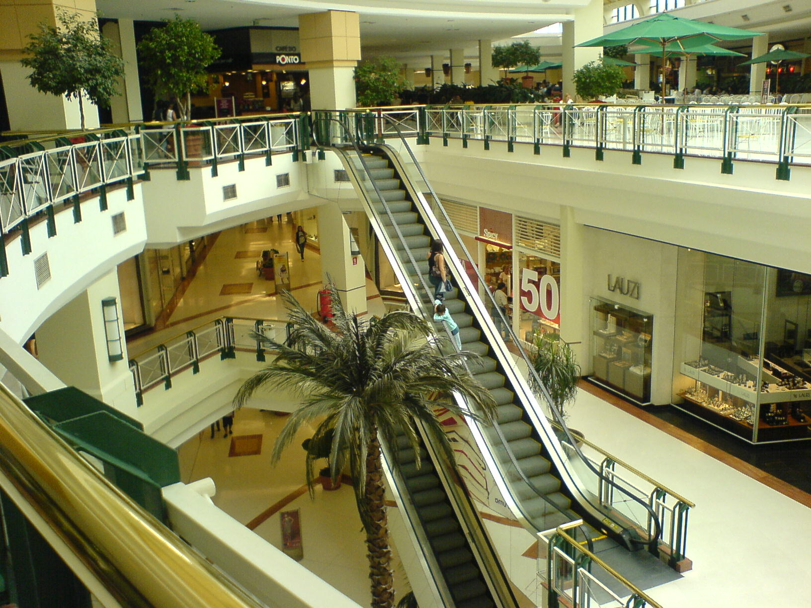 Dentro do Shopping - Foto 2